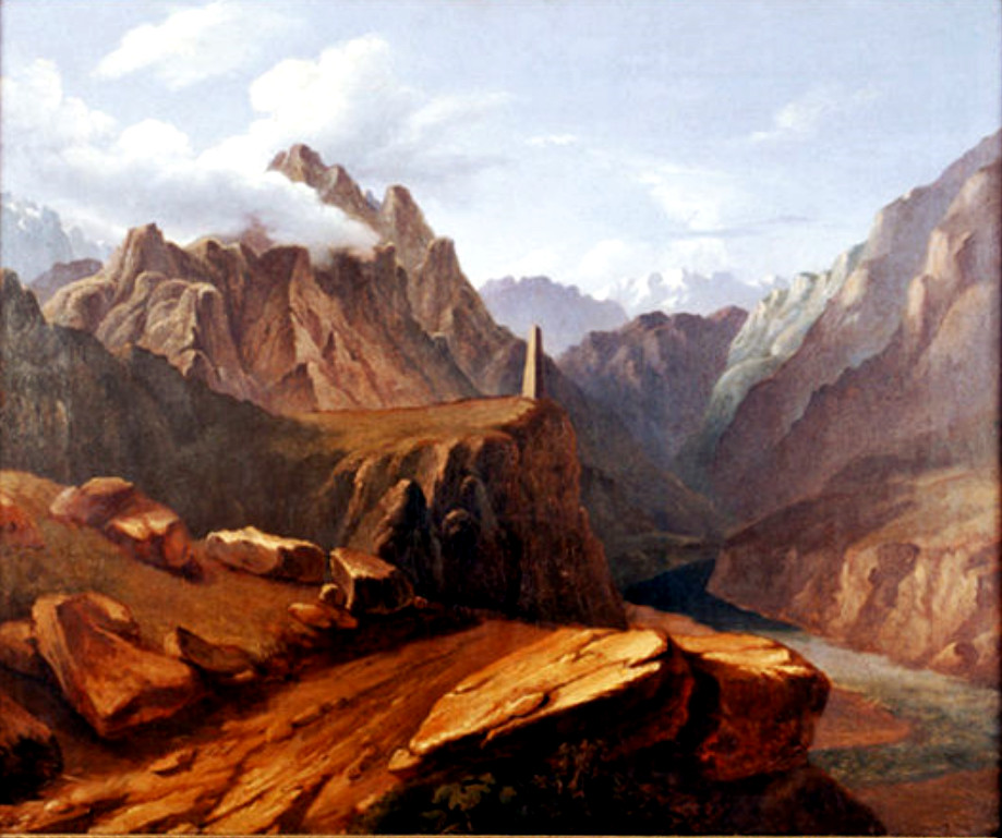 Лермонтов Кавказский вид возле селения Сиони